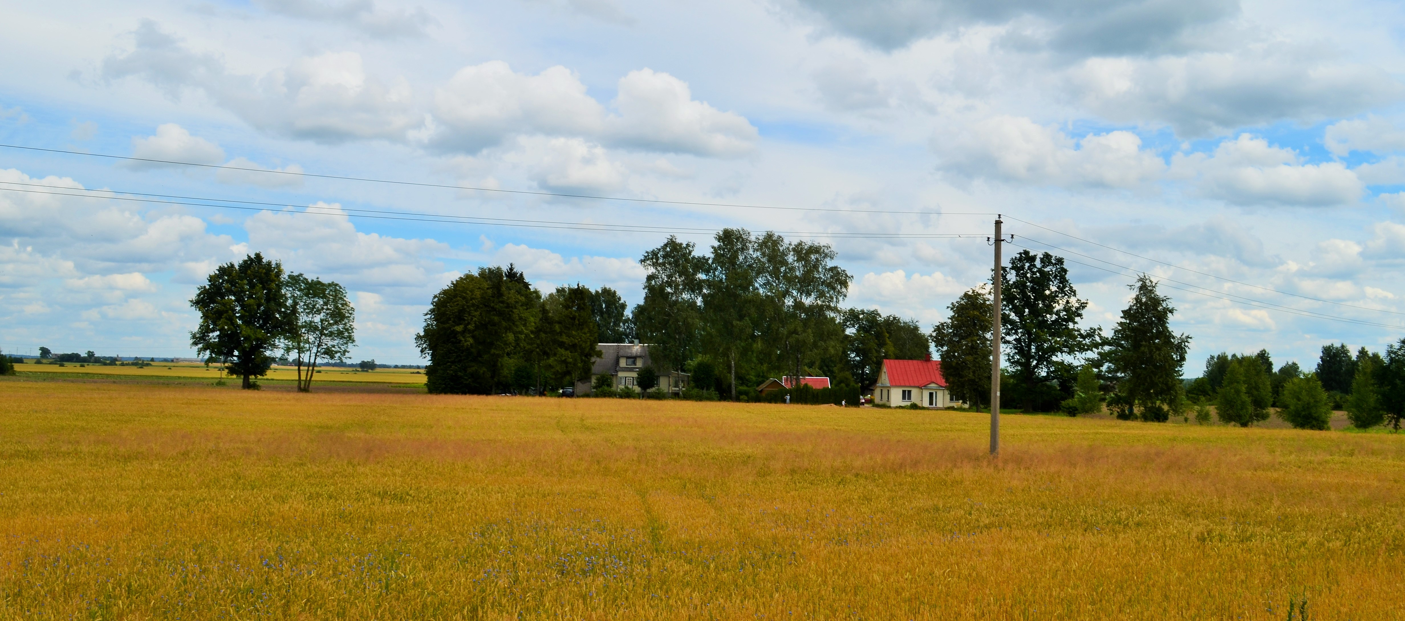 Šlapių Priemiestis, Ukmergės raj.